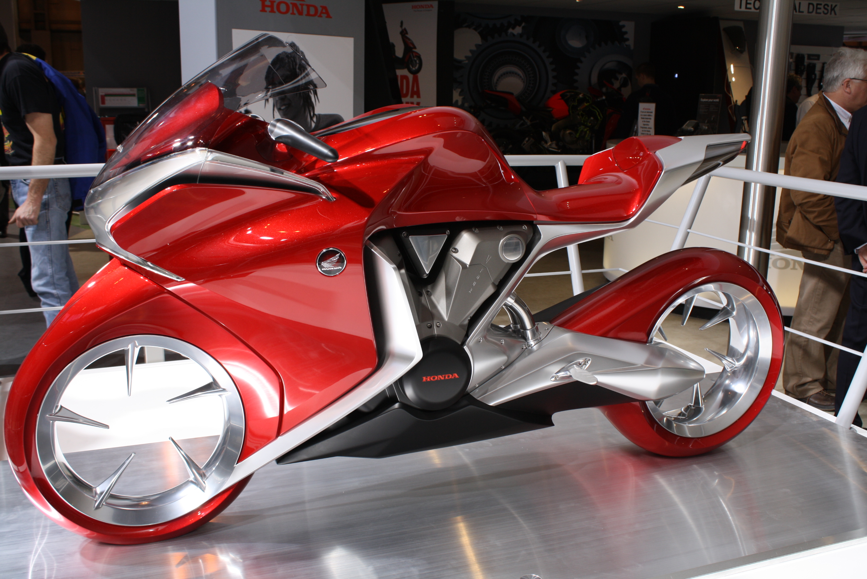 Honda V4 Concept left